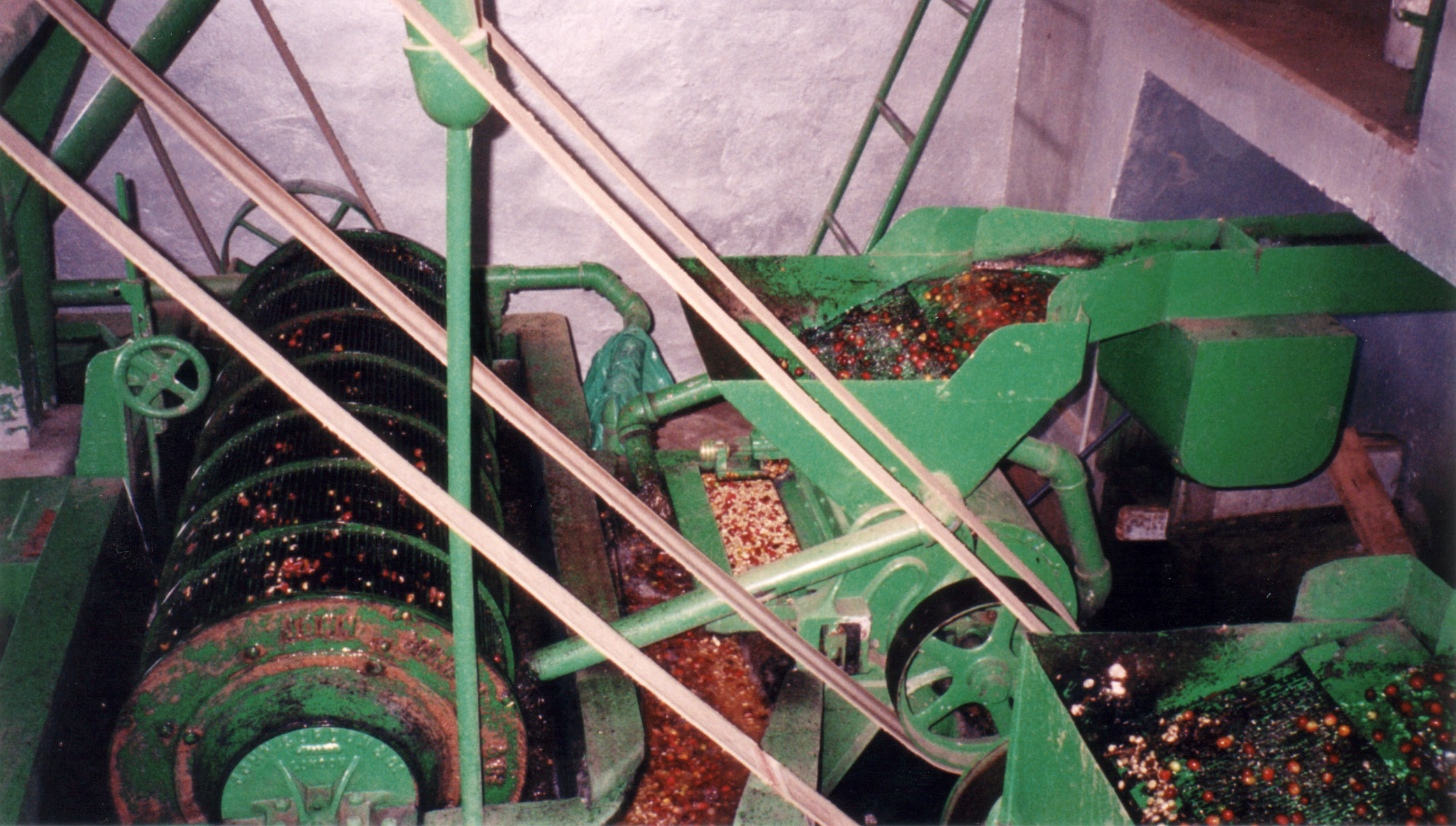 Procesamiento de café por el método húmedo Coffee processing aquapulp